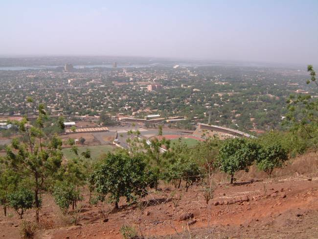 Panorama de Bamako vu depuis une des collines surplombant Bamako.